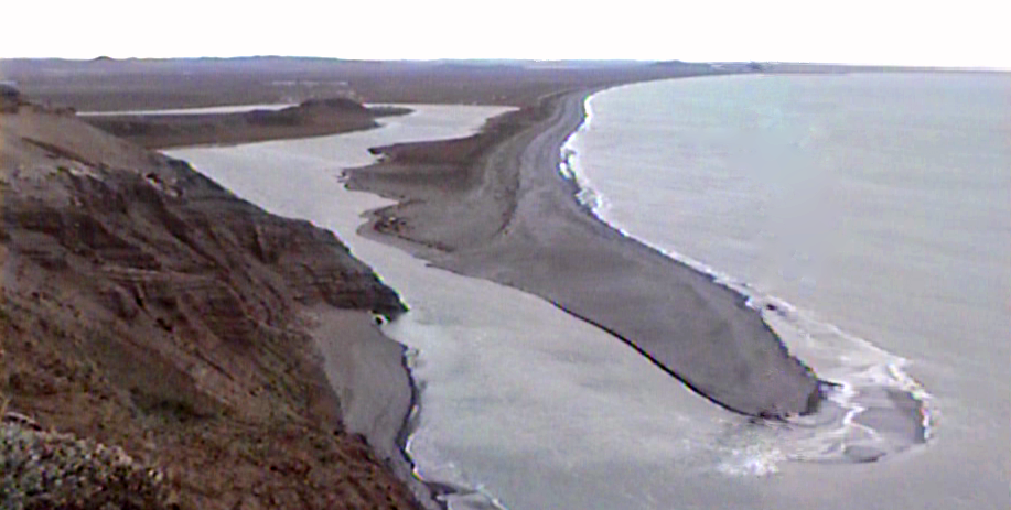 La desembocadura del río Chico en el mar Argentino, vista desde la cumbre del morro del cabo Domingo, en la Patagonia argentina. Se encuentra en la costa oriental de la isla Grande de Tierra del Fuego, la mayor del archipiélago homónimo, extremo austral del continente americano.